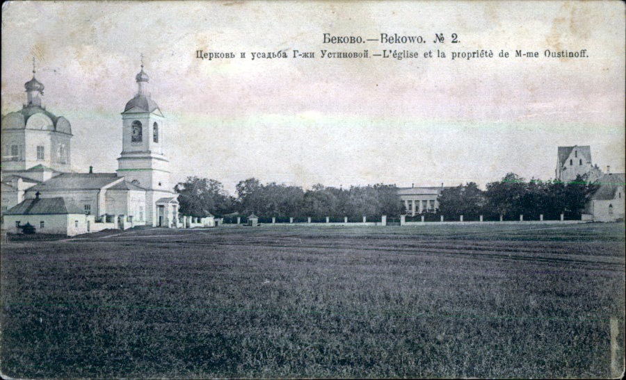 Беково. Церковь и усадьба г-жи Устиновой. Фотограф Еникеев Н. до 1914